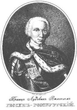 Ludwig Gruno von Hessen-Homburg russian Field Marchall